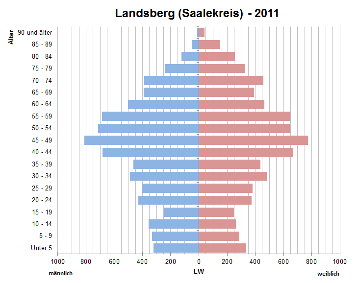 Bevölkerungspyramide der Stadt Landsberg (Saalekreis) nach Zensus 2011.